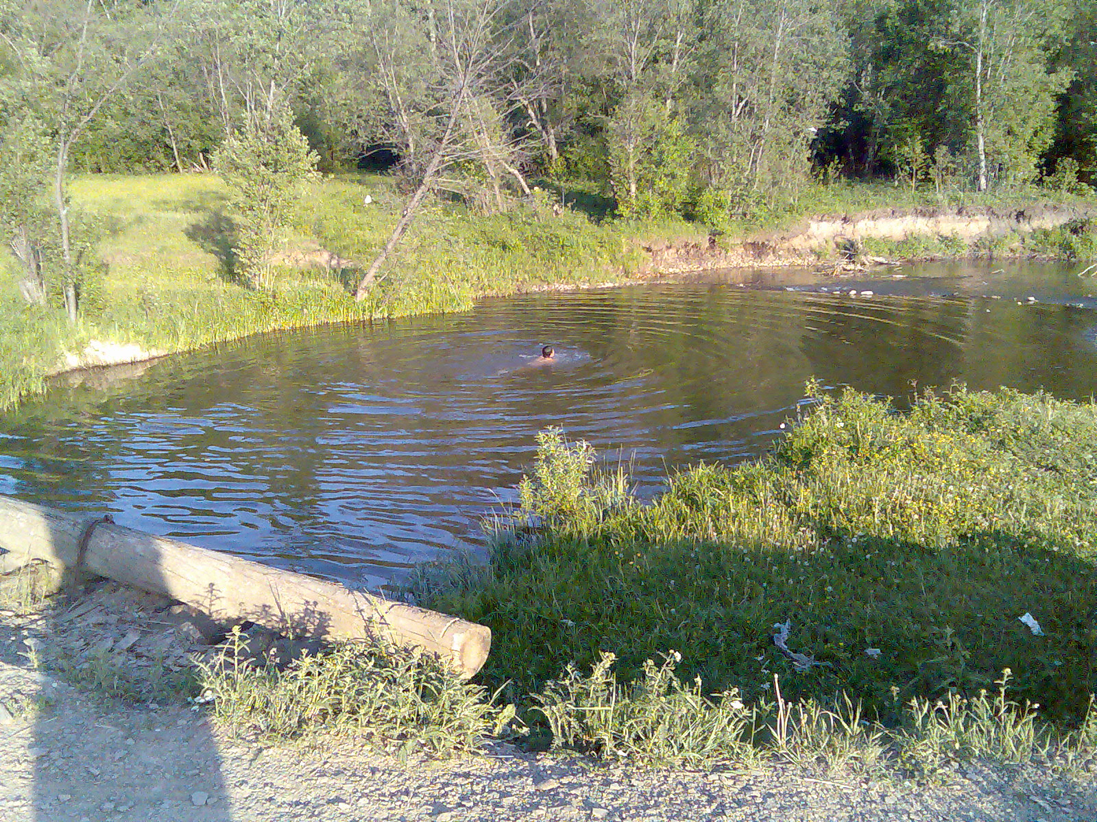 Зилим возле Бутаево